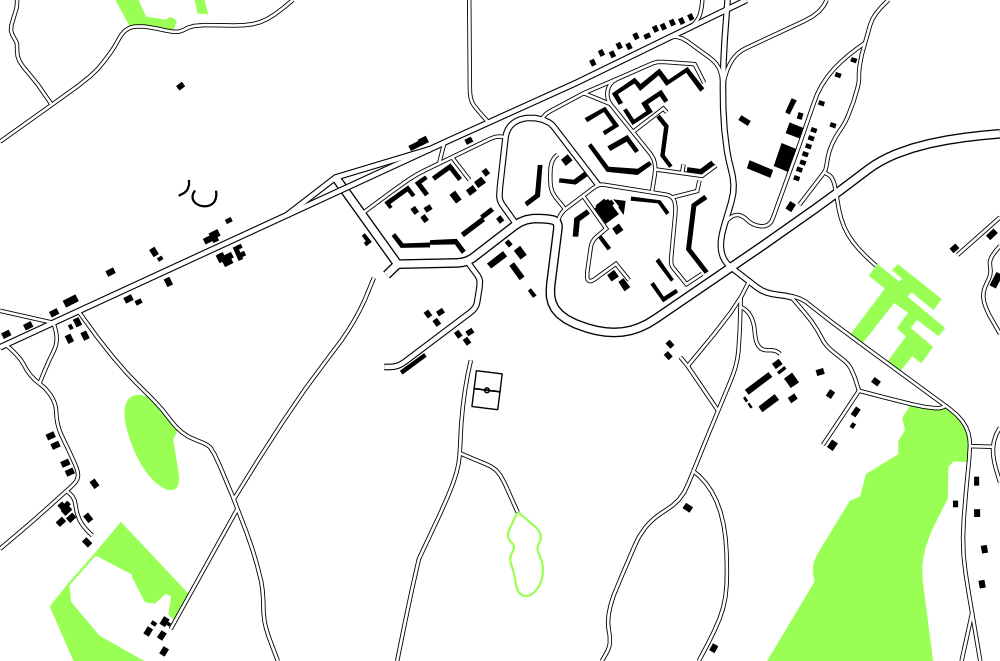 Plan du quartier de Planoise à Besançon réalisé à partir des cadastres de 1970.